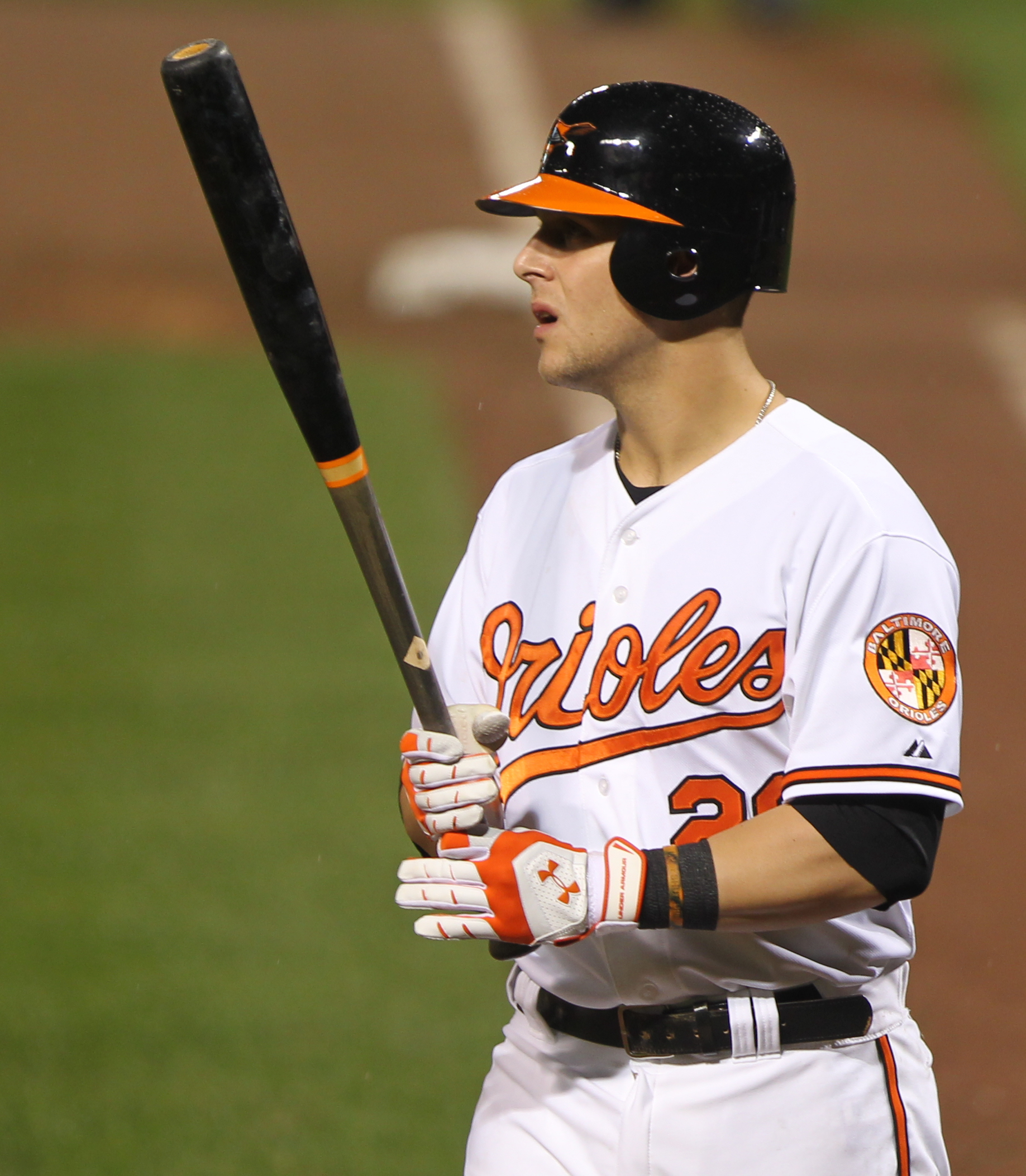 Brandon Snyder